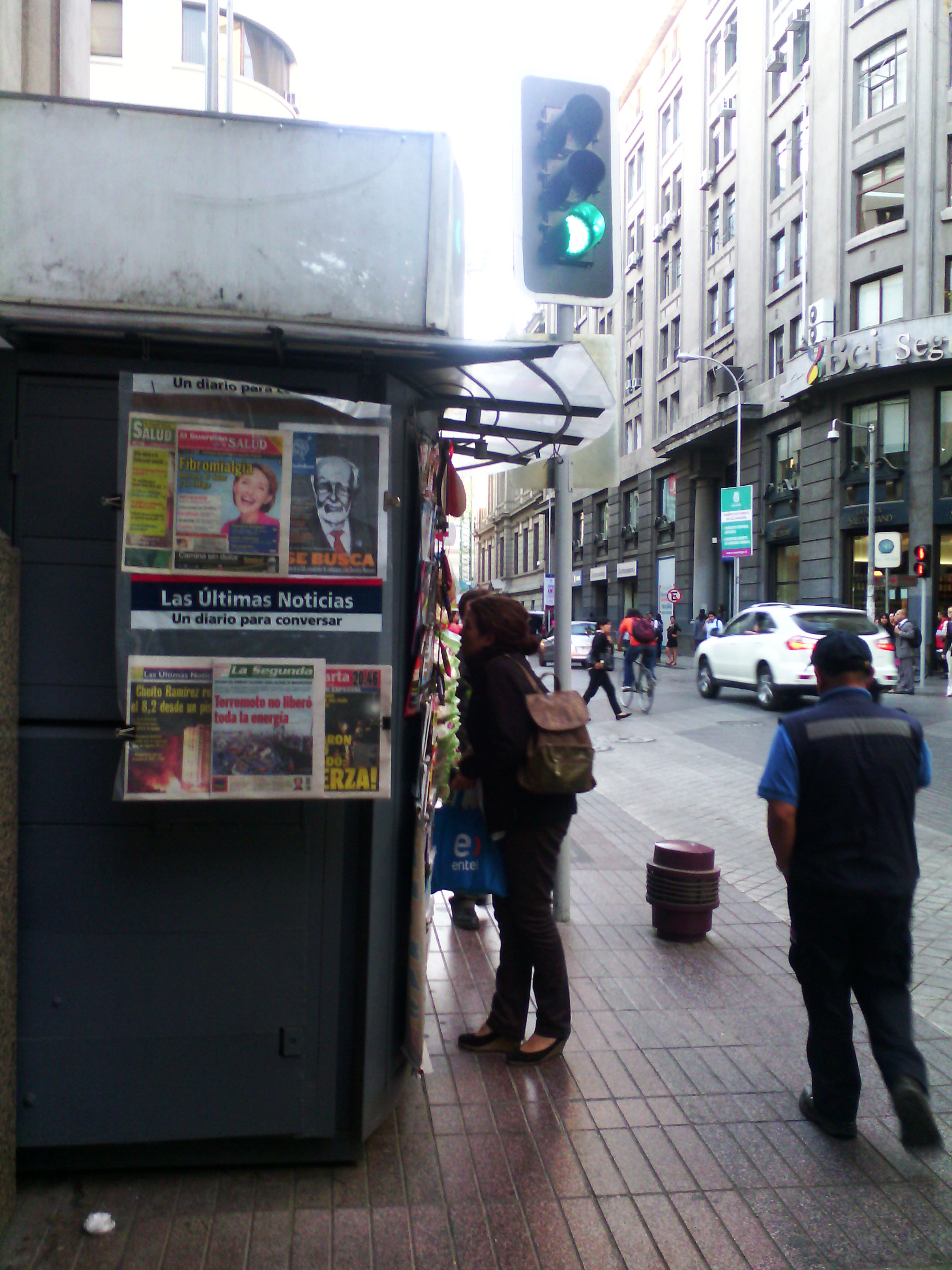 Un kiosco de diarios en el centro de Santiago (específicamente Morandé con Paseo Huérfanos), el día tras el terremoto en Iquique de abril de 2014. Se ven los periódicos "El Guardian de la Salud", "(...) Salud", "El Ciudadano", y los diarios "Las Últimas Noticias", el vespertino "La Segunda", y "La Cuarta".